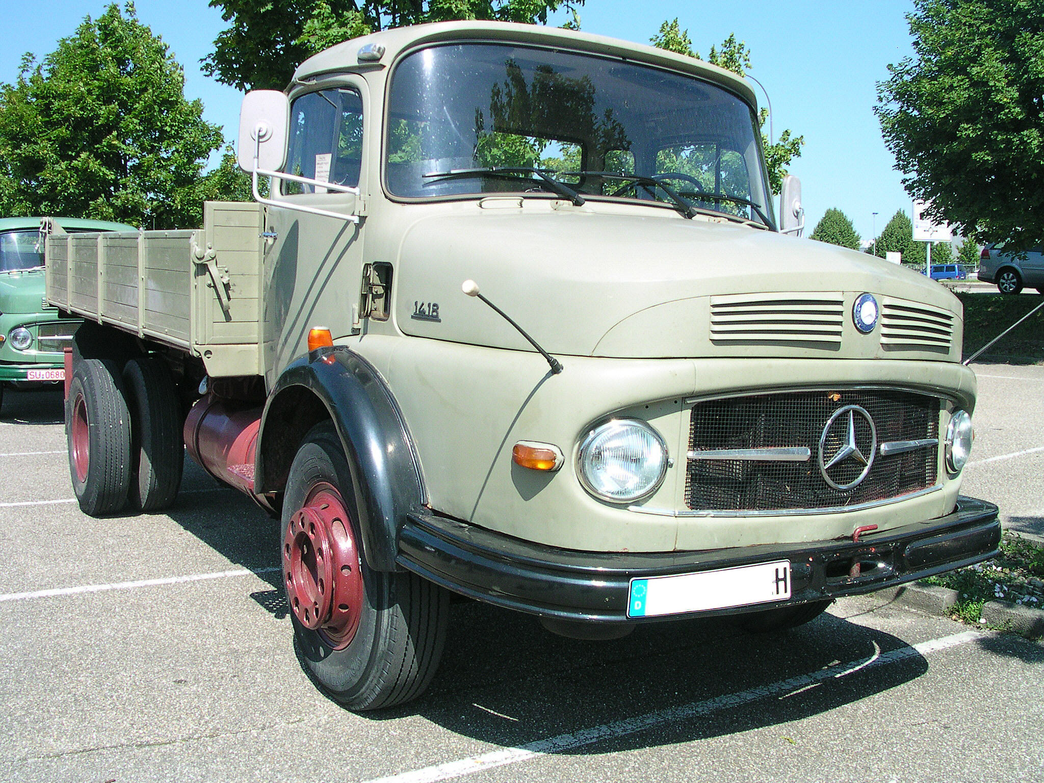 Mercedes 1418 in Wörth am Rhein beim Oldtimer-Treffen bei Daimler-Chrysler